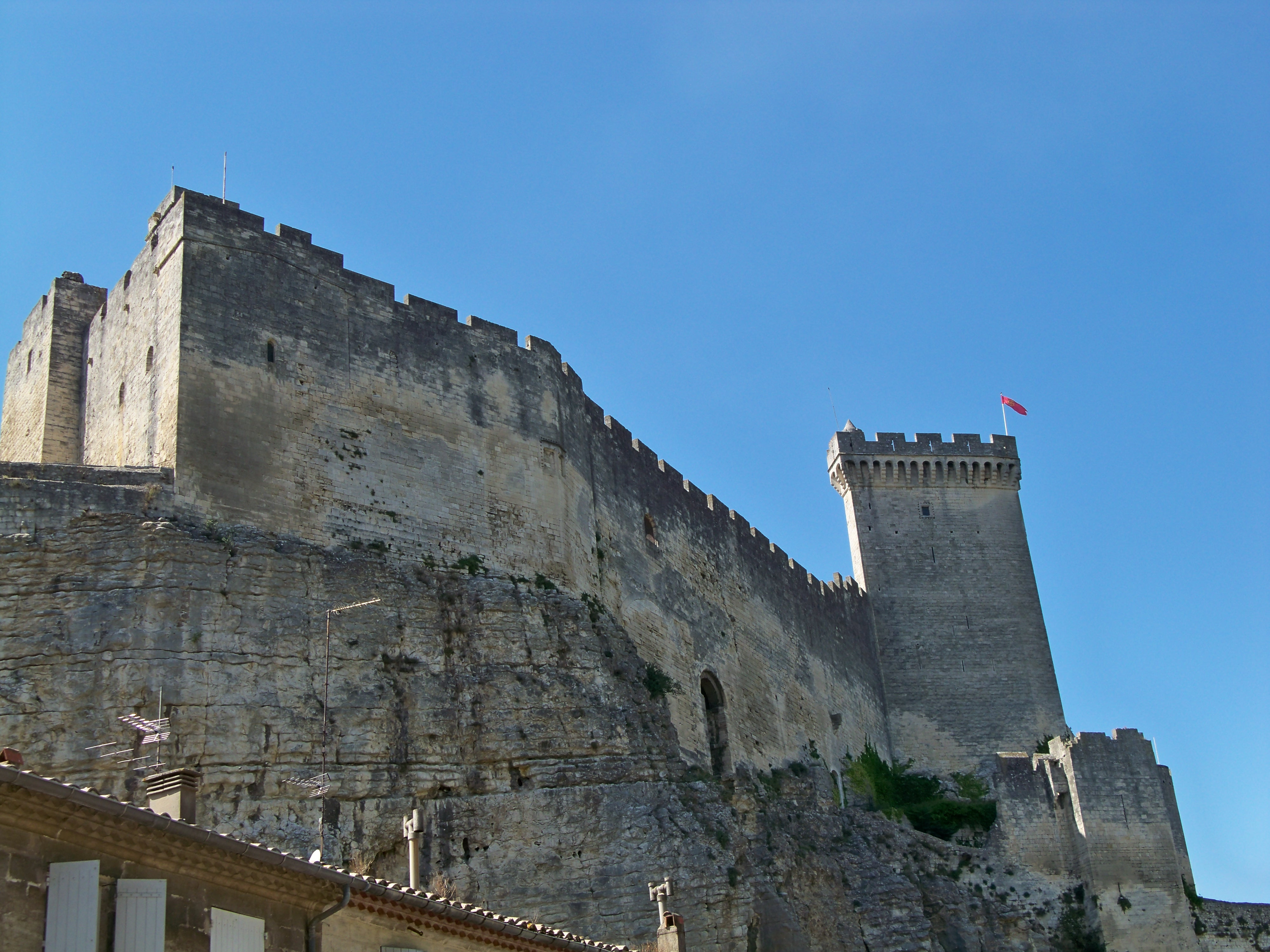 Château de Beaucaire (30)